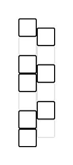 Bildliche Darstellung der so genannten Zigeuner-Moll-Tonleiter.